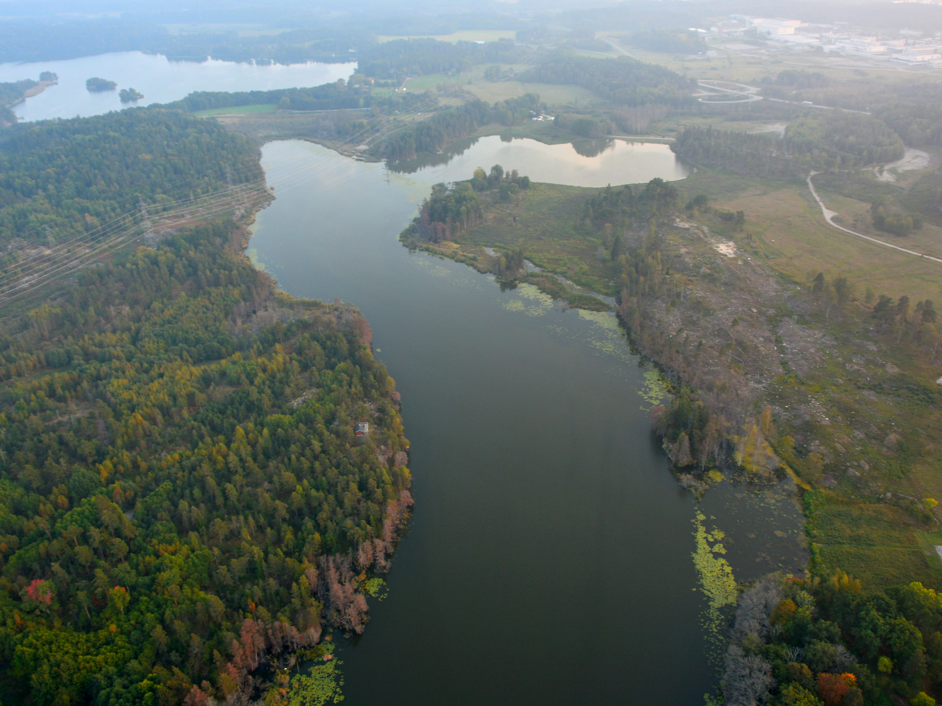 Glasbergasjön i Södertälje kommun.